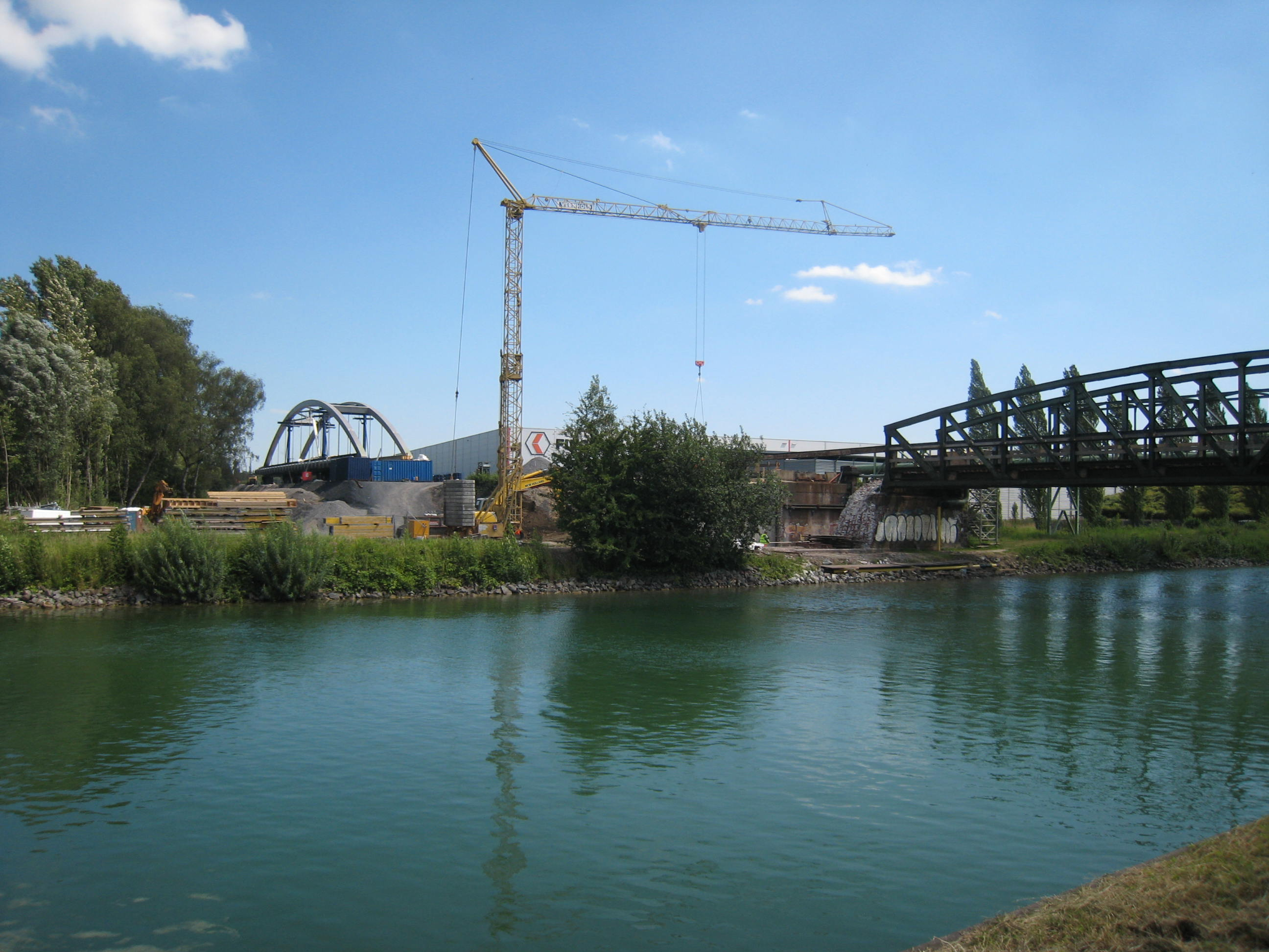 Güterumgehungsbahn Dortmund Brückenneubau 2008